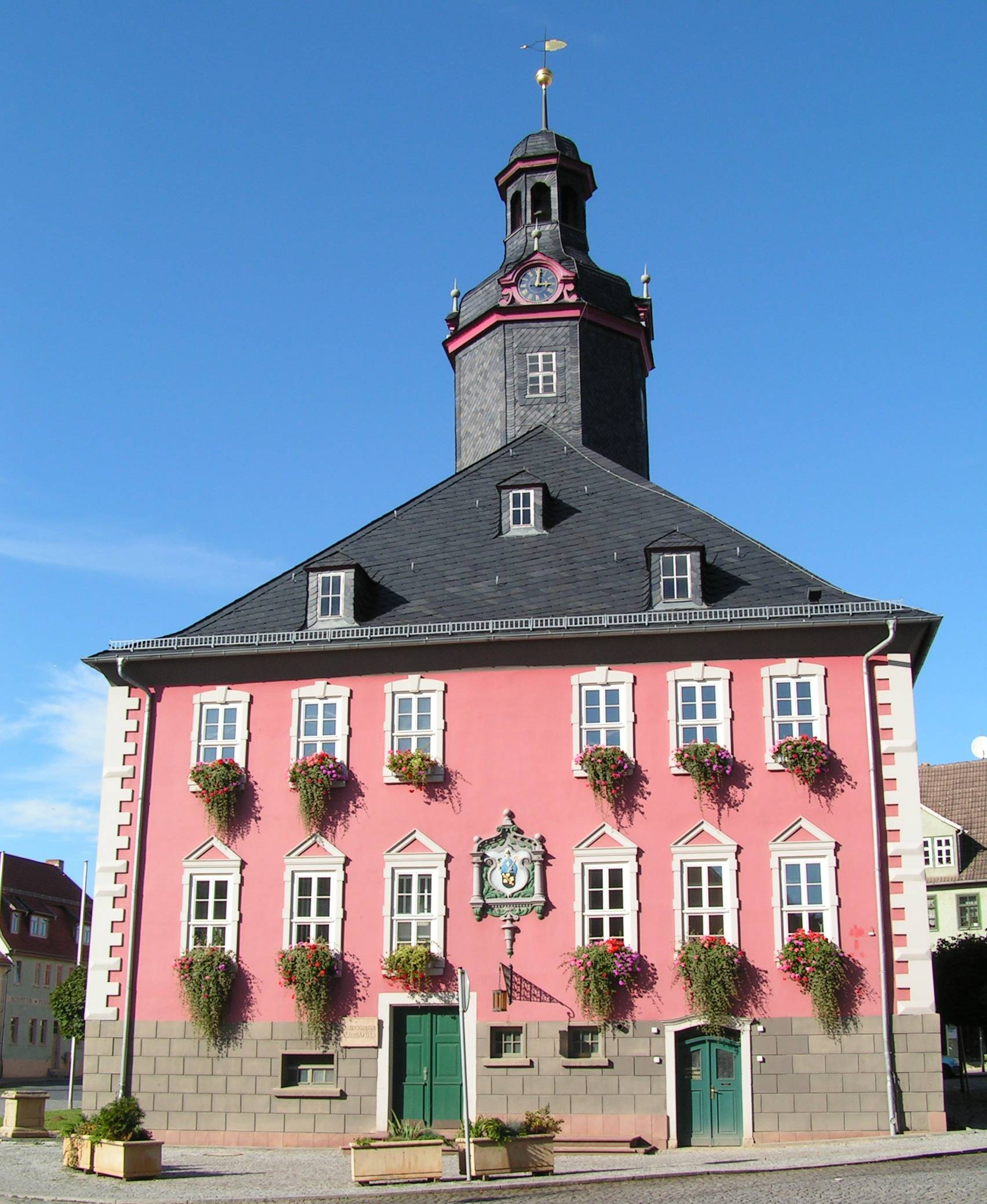 Rathaus von Kölleda (Thüringen, Deutschland)